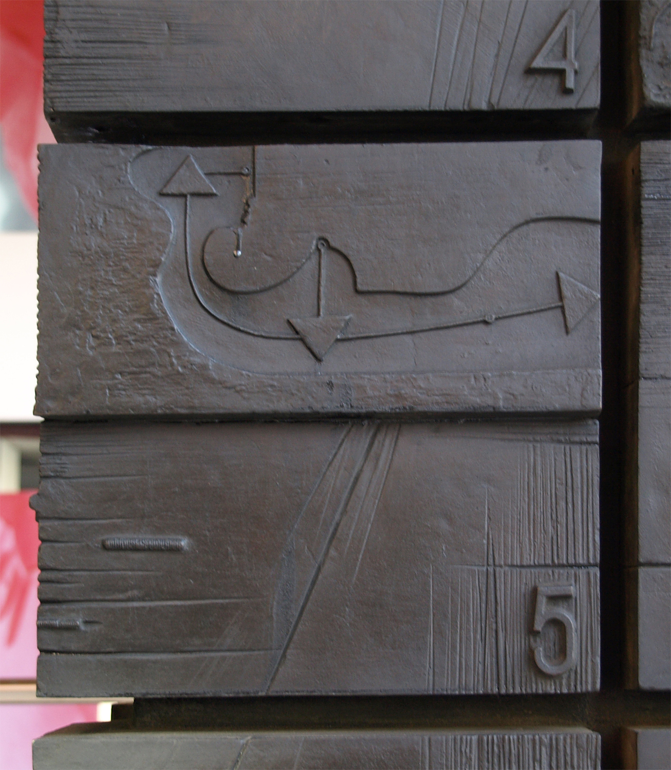 Espai / Temps (Josep María Subirachs, 1967)